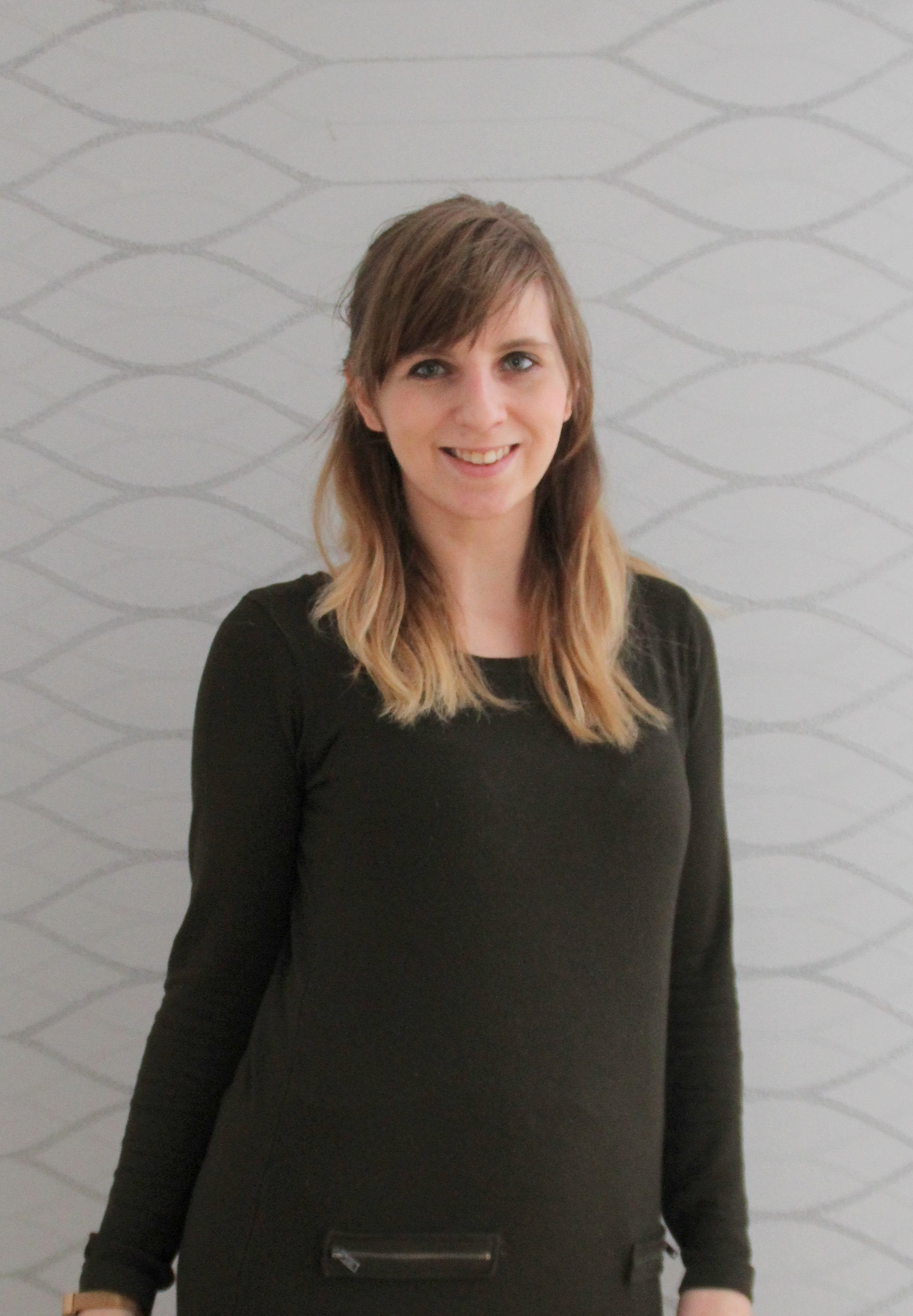 Bloggerin Sabrina Rebecca Heinke, Nov. 2017